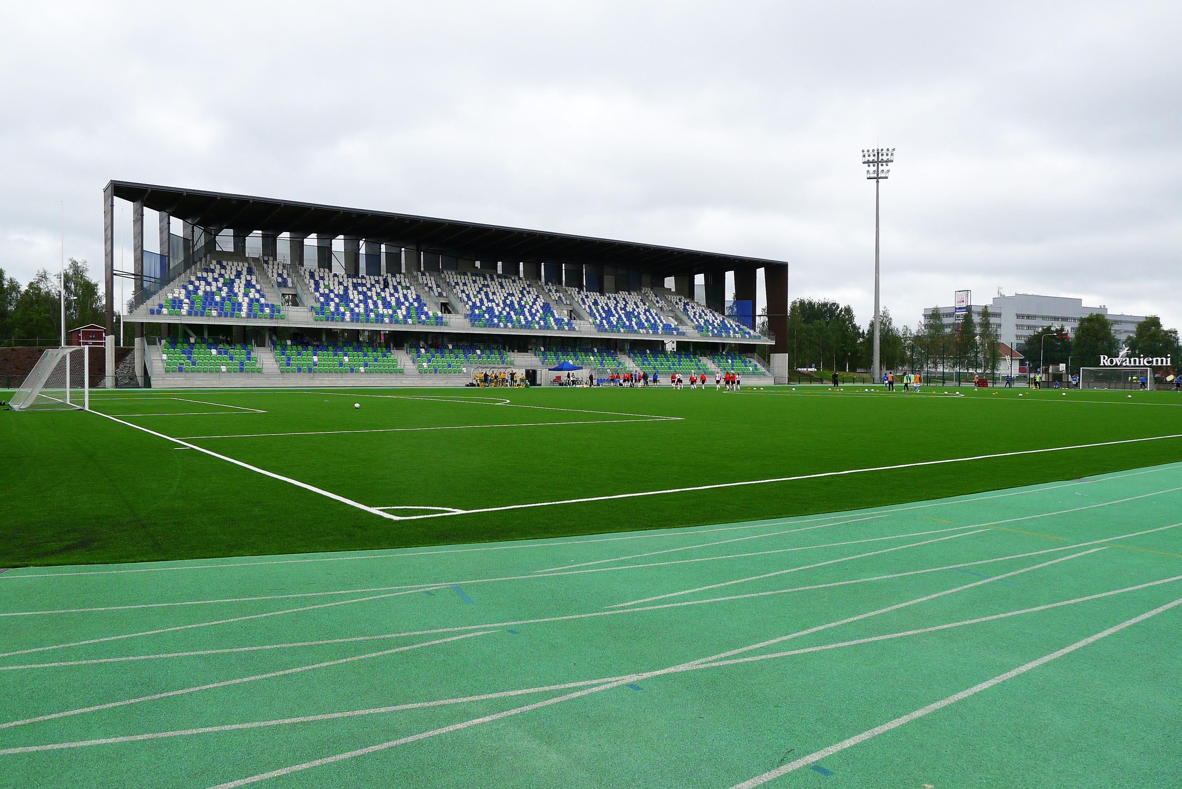 Rovaniemen keskuskenttä 8.7.2016